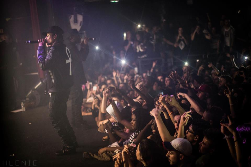 Ateyaba Tour